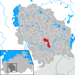 Rom in Mecklenburg-Vorpommern - District Parchim